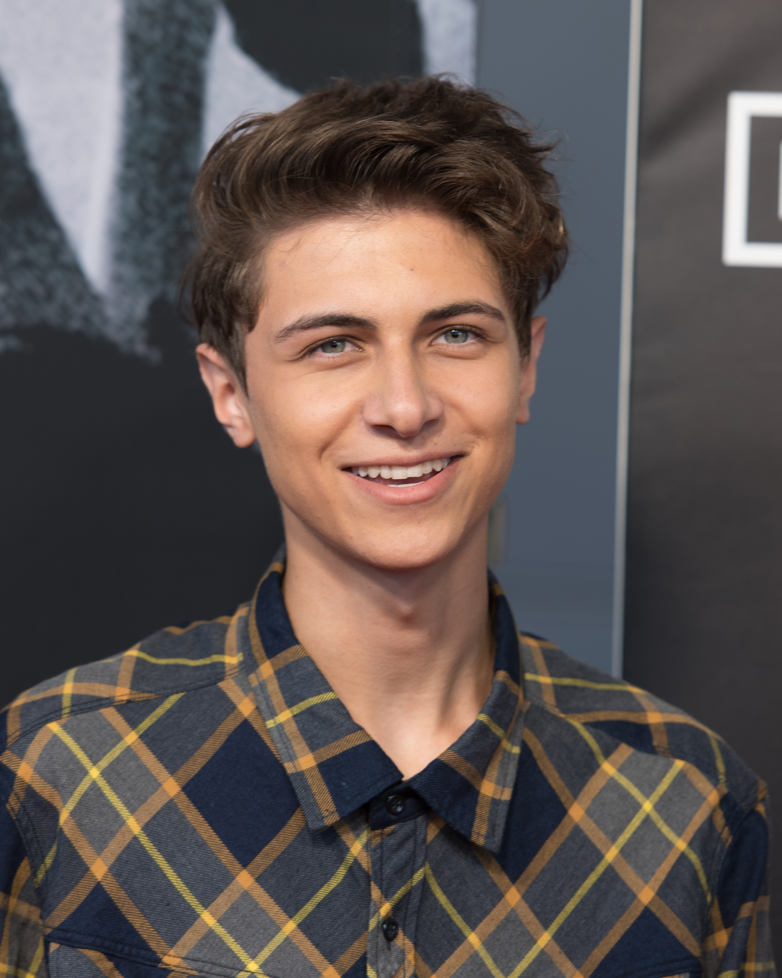 Lukas Rieger' beim Global Citizen Festival in Hamburg